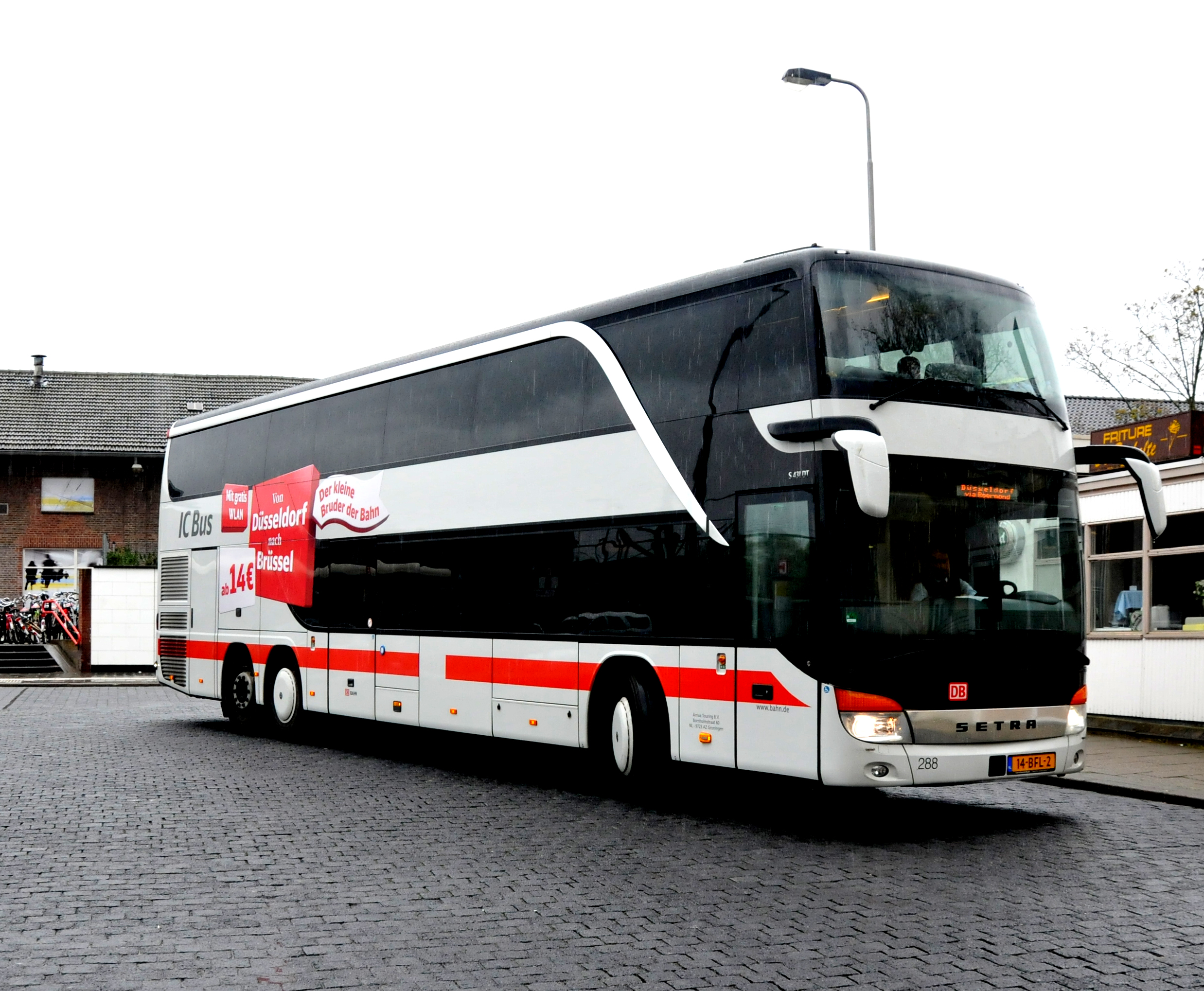 Arriva/DB bus 288 als IC-bus naar Düsseldorf te Roermond.